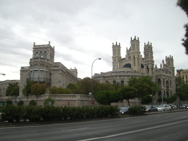 Vista desde el ángulo noreste del Hospital de Jornaleros, también conocido como Hospital de Maudes.